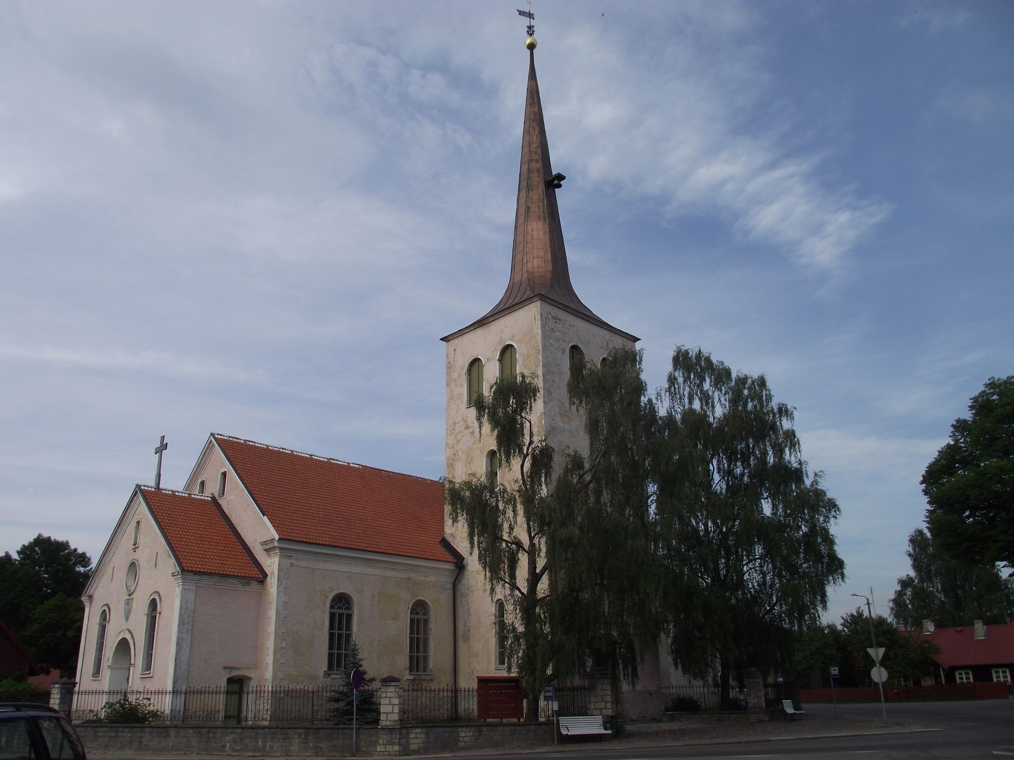 Paide Püha Risti kirik.